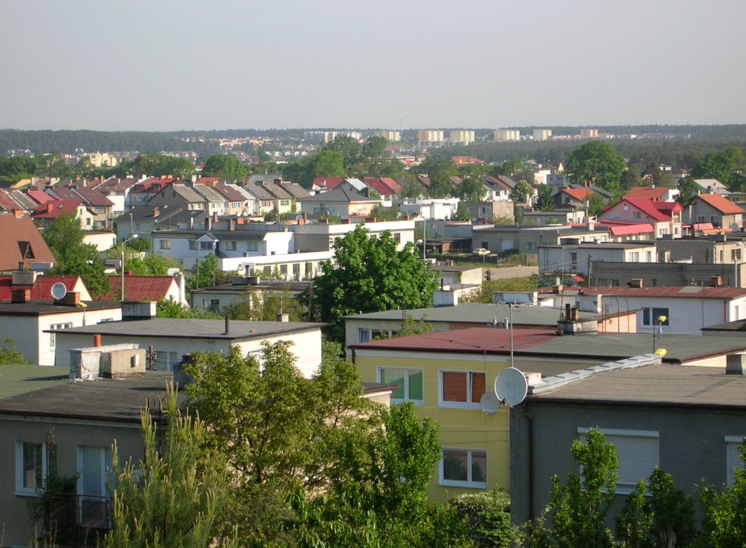 Osiedle Miedzyń w Bydgoszczy